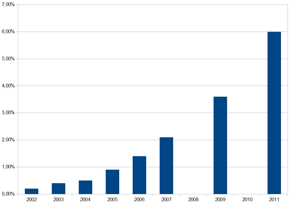 Graphique illustrant la part de marché des logiciles libres entre 2002 et 2007 (données sources : Wikipédia)